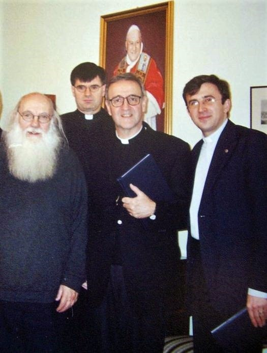 Иосиф де Вольф на приеме у архиепископа Антонио Меннини, Апостольская нунциатура в Москве, 2004